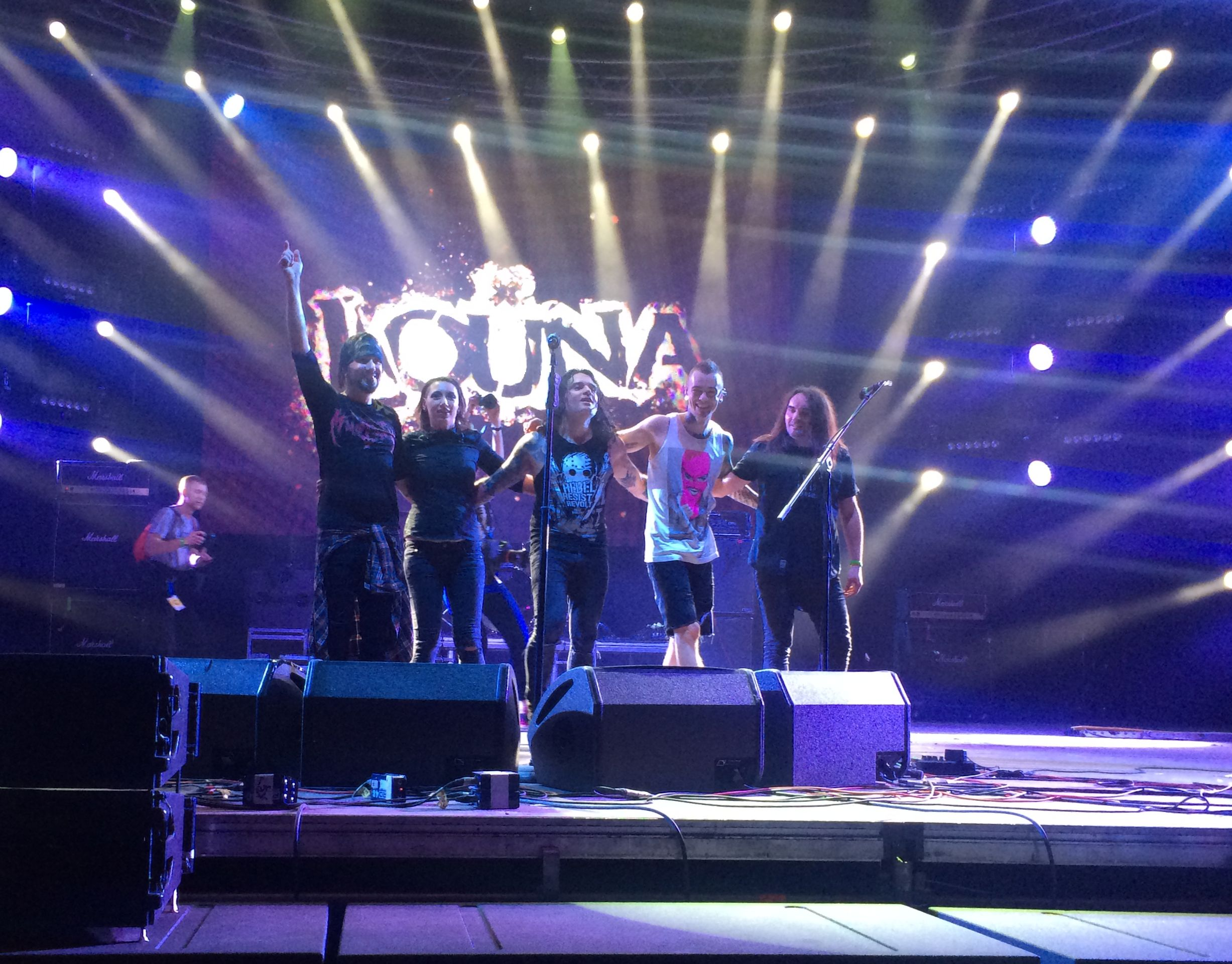 Atlas Weekend 2017. Виступ Louna